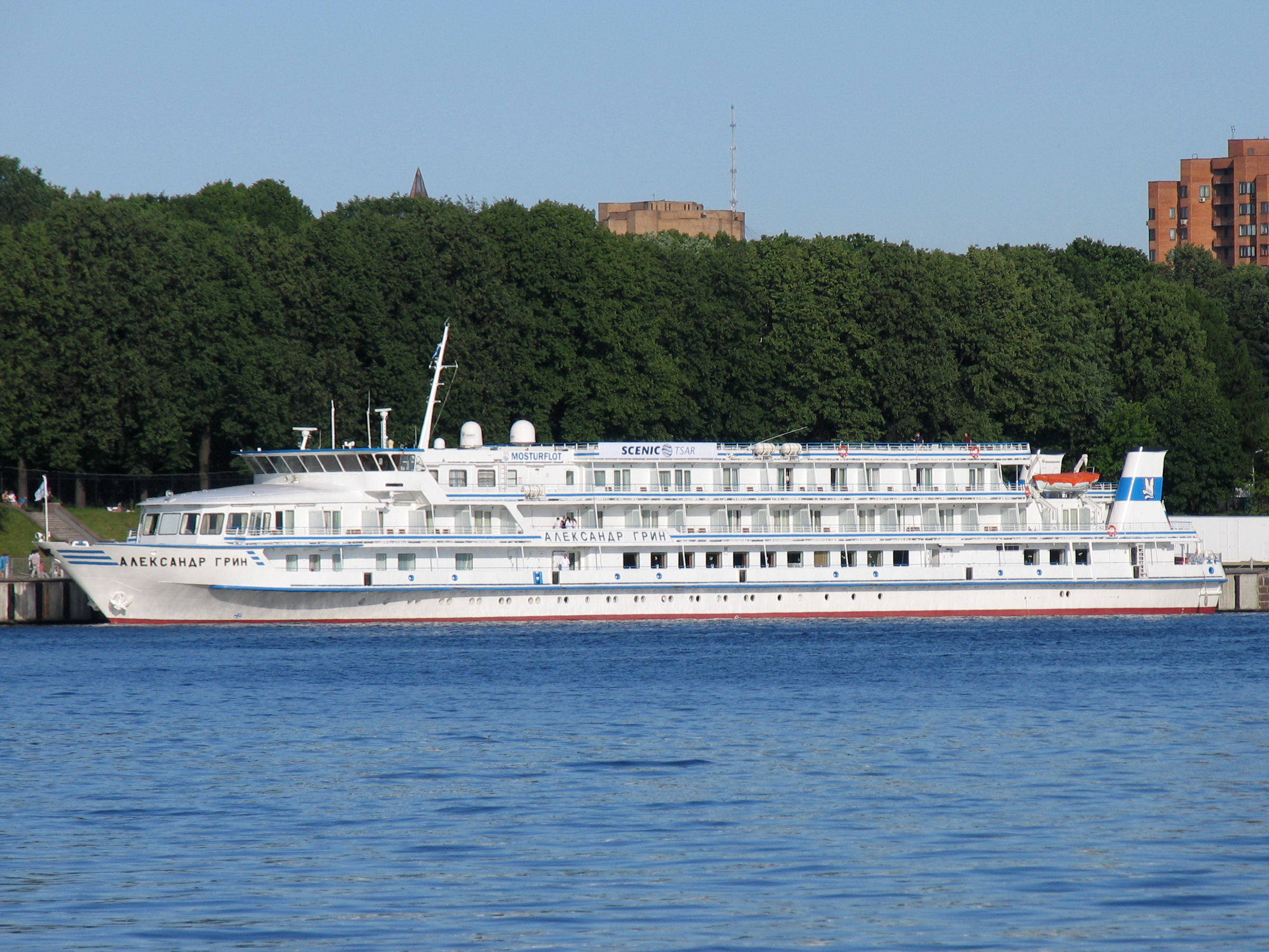 Речной круизный теплоход "Александр Грин" в Северном речном порту.